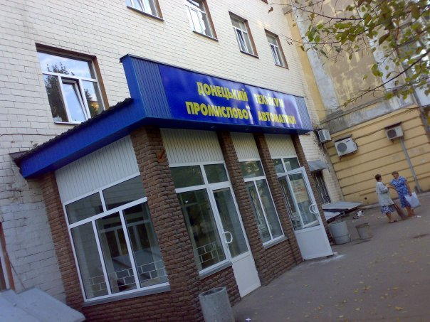 Донецкий техникум промышленной автоматики